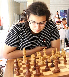 Ayan Allahverdiyeva 2018-ci ildə